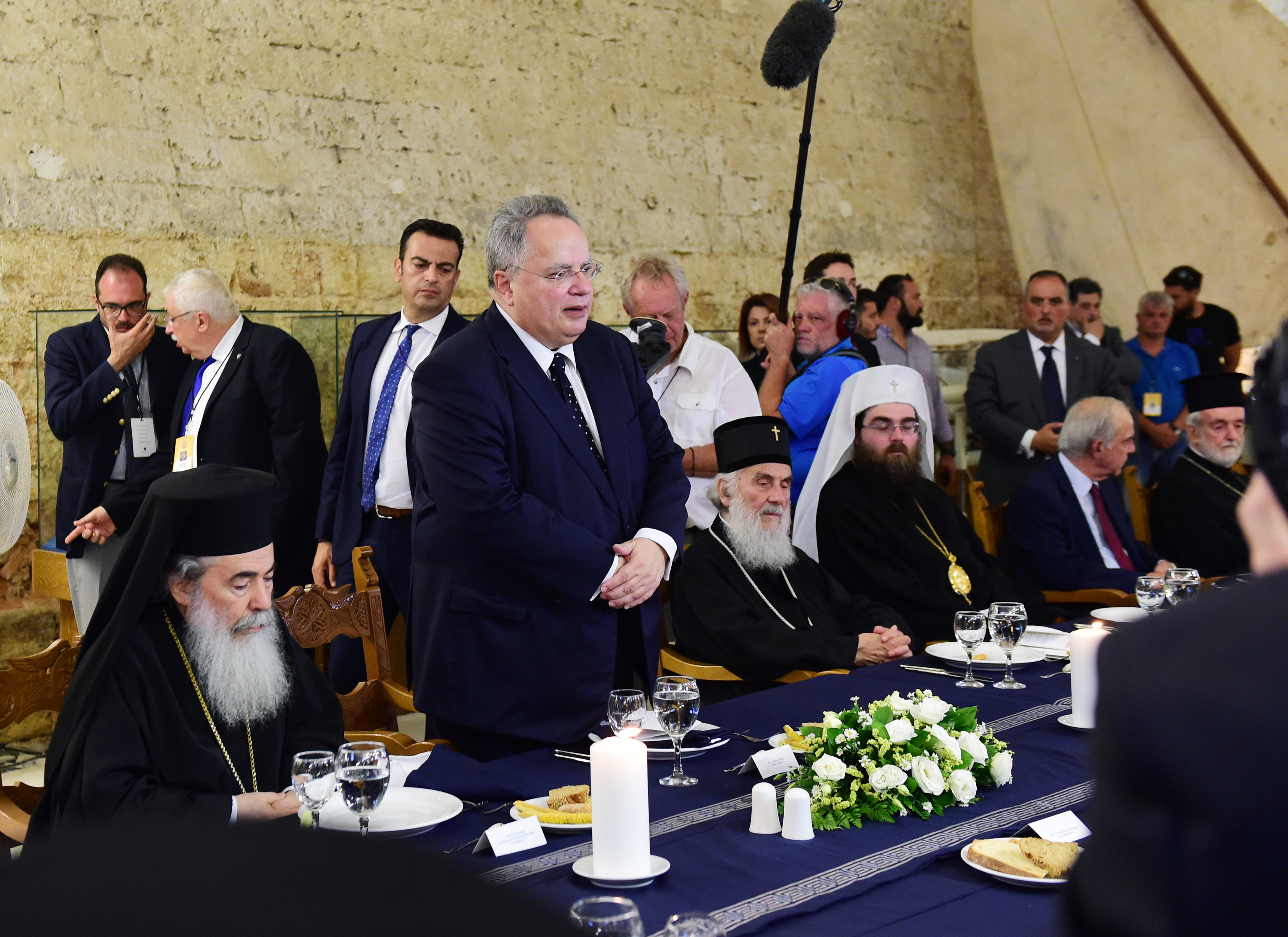 O Υπουργός Εξωτερικών κ. Ν. Κοτζιάς στο δείπνο που παρέθεσε προς τιμήν των Προκαθημένων, ενόψει της Αγίας και Μεγάλης Συνόδου της Ορθόδοξης Εκκλησίας Κρήτη, 16.06.2016 Πηγή: ΑΠΕ-ΜΠΕ